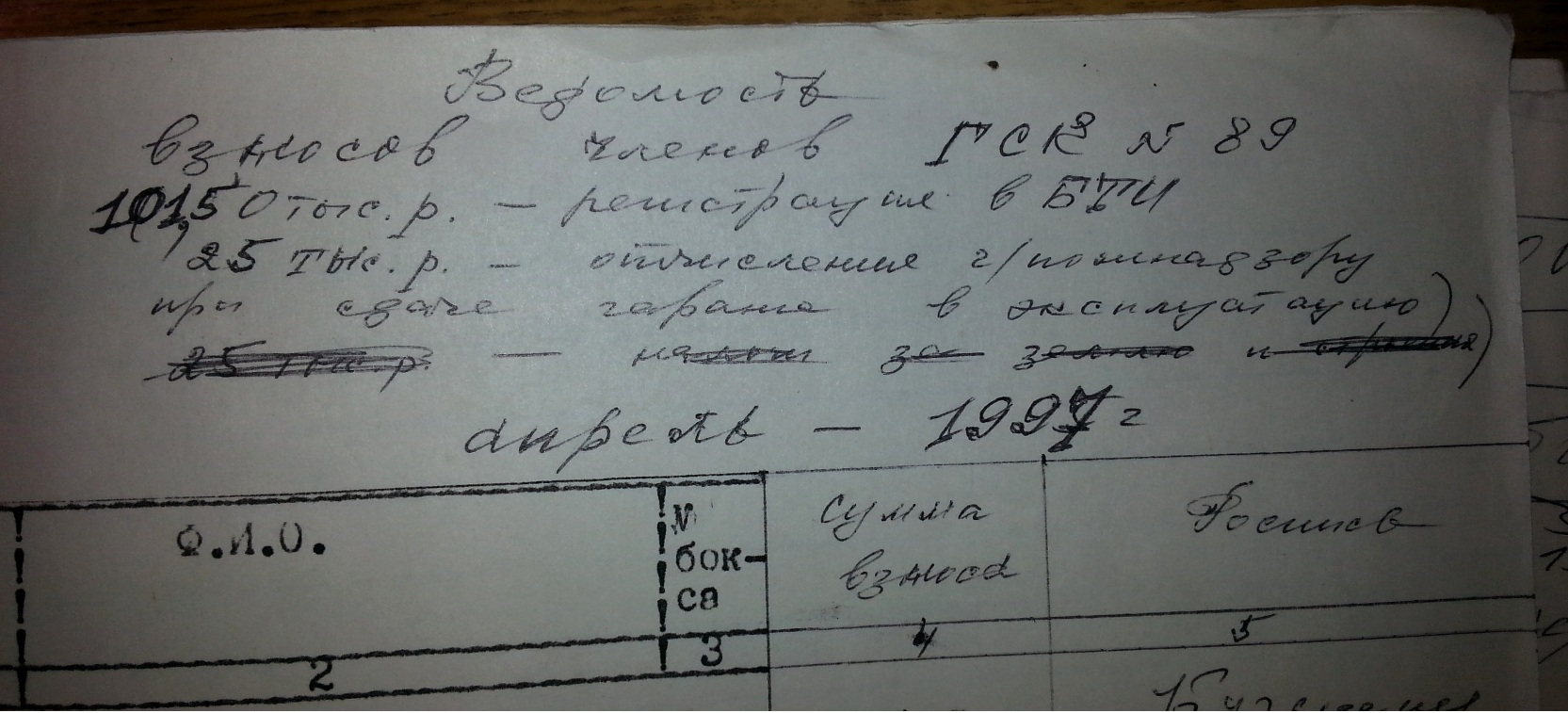 Ведомость взносов членов гаражно-строительного кооператива